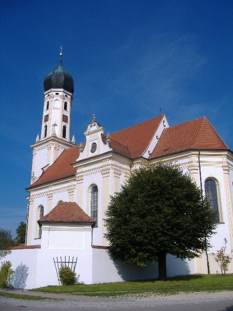 Unterliezheim